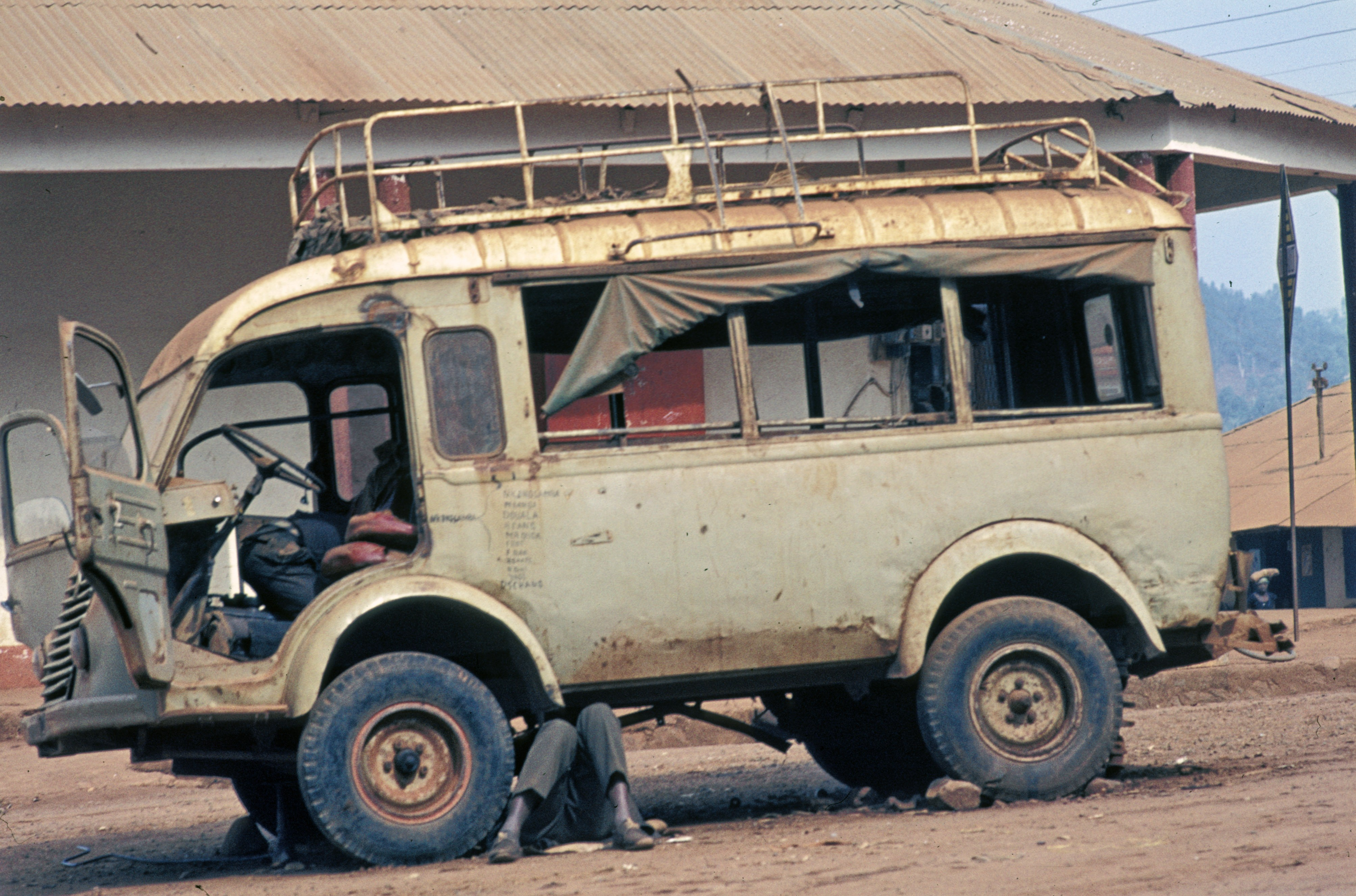 Cameroon